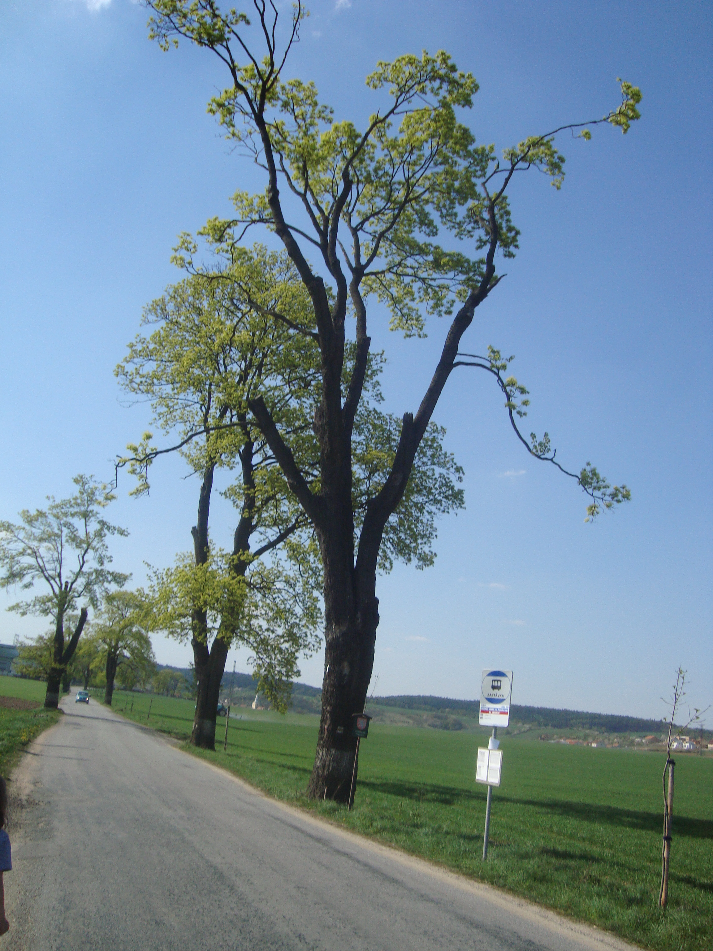 Památné javorové stromořadí Veverské Knínice